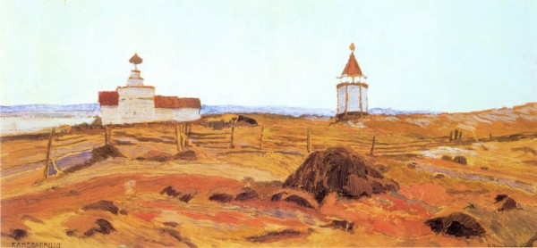 Картина "Белое море. Кандалакша" Василия Переплётчикова